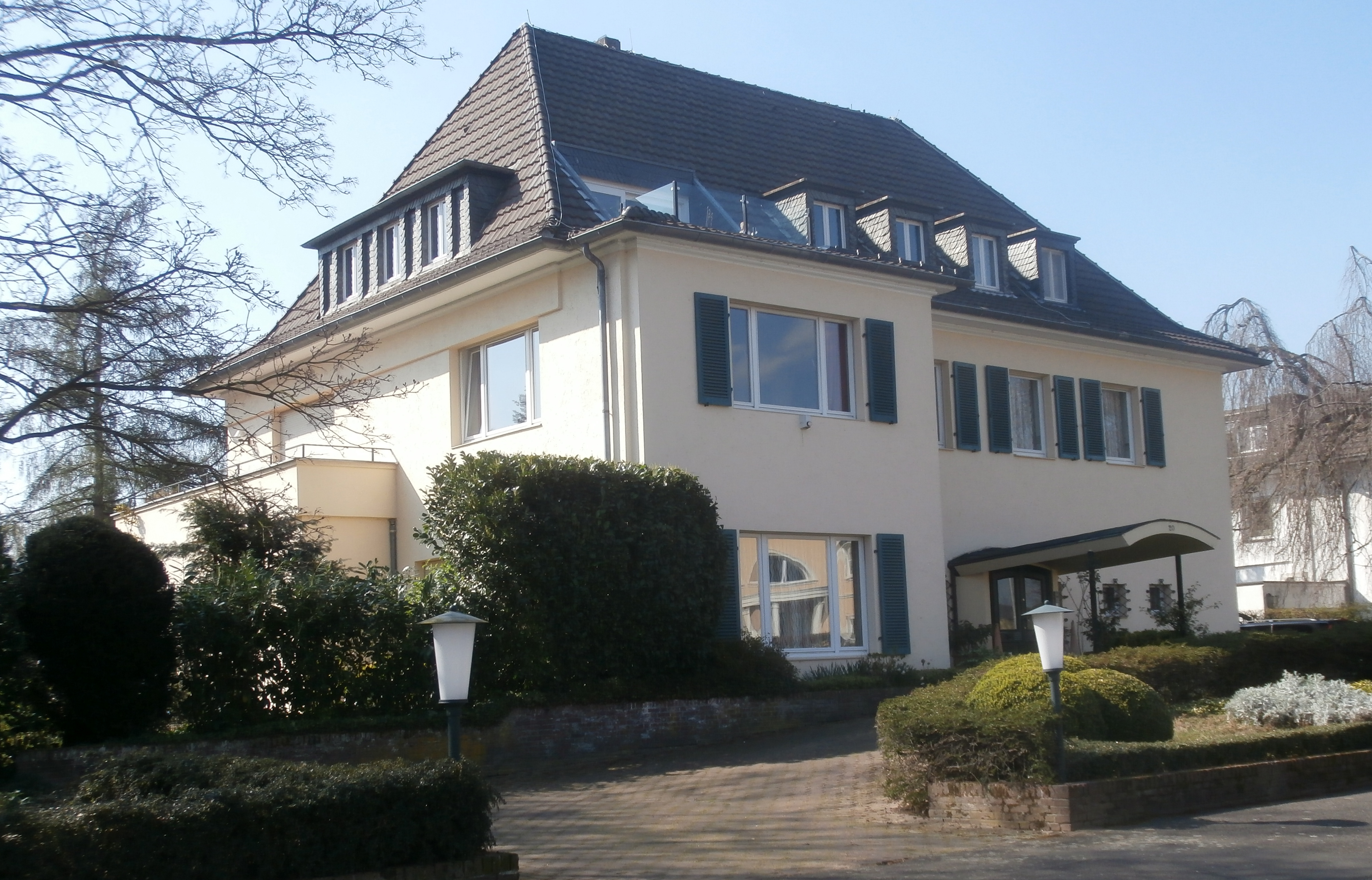 Ehemalige Residenz der Königlich-Niederländischen Botschaft, Fasanenstraße 20, Rüngsdorf, Bad Godesberg